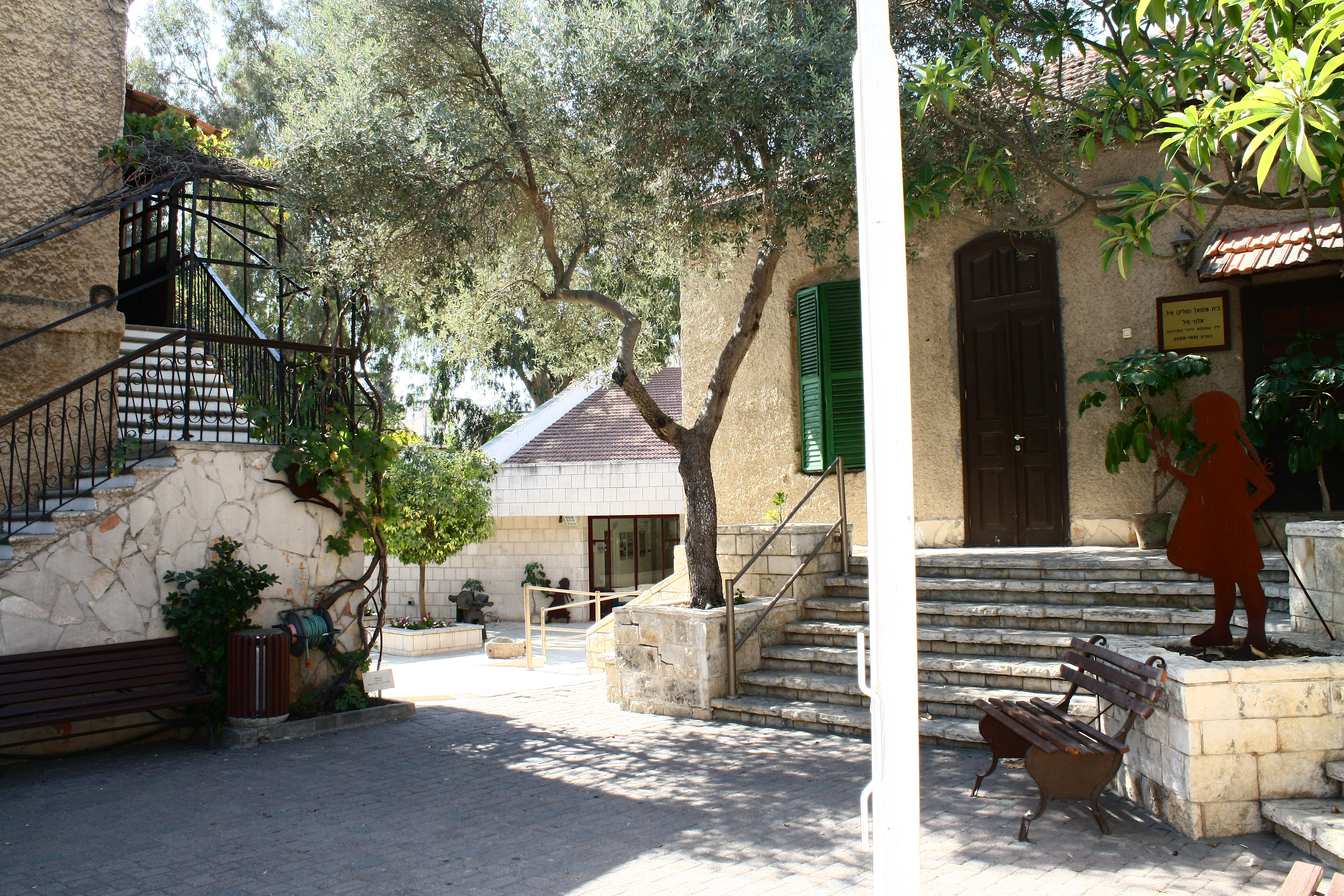 בית מרקחת ודואר, כיום חלק המוזיאון ראשון לציון.